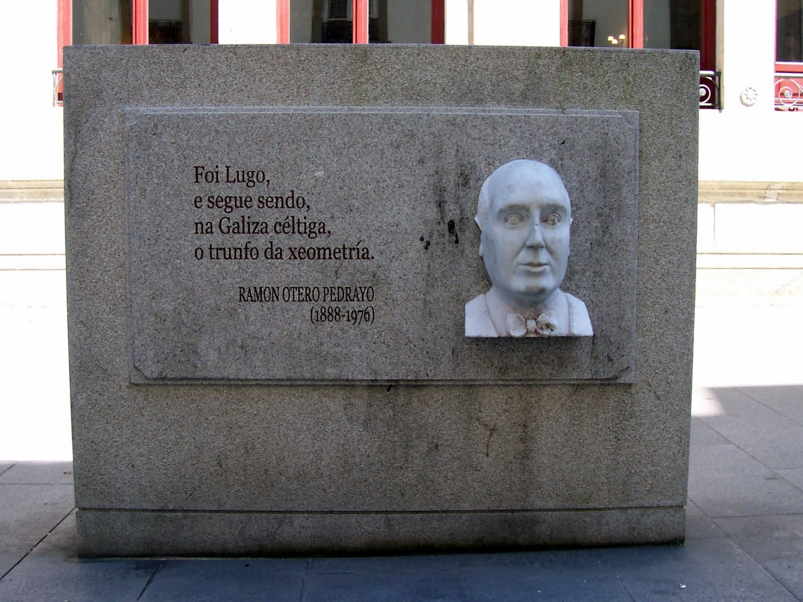 Placa en Lugo de a Otero Pedrayo, dunha serie adicada a escritores galegos. Categoría:Imaxes de esculturas de Lugo Otero Pedrayo Categoría:Imaxes de placas de Galicia